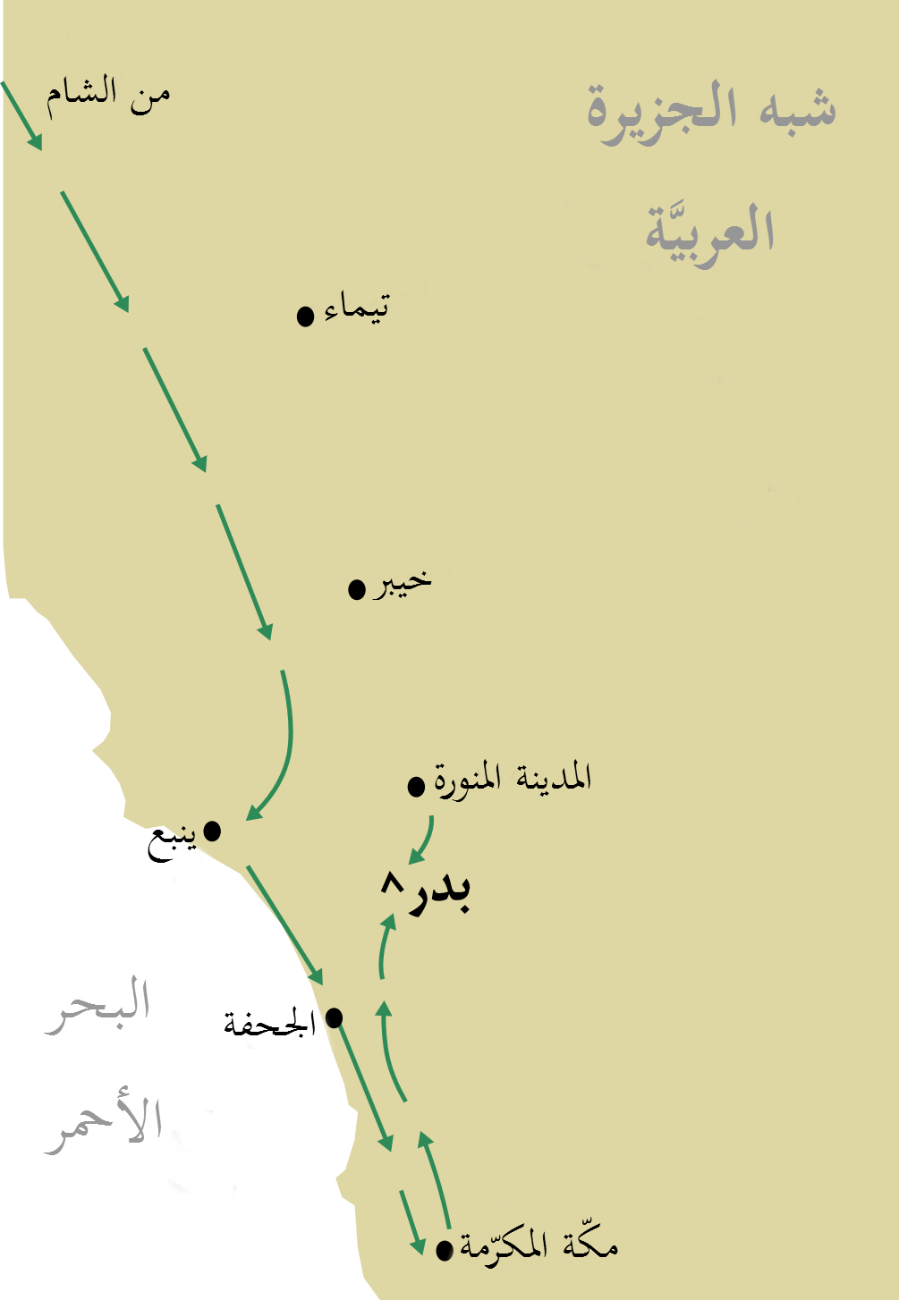 خريطة لحملة بدر التي انتصر فيها المُسلمون على مُشركي قُريش.